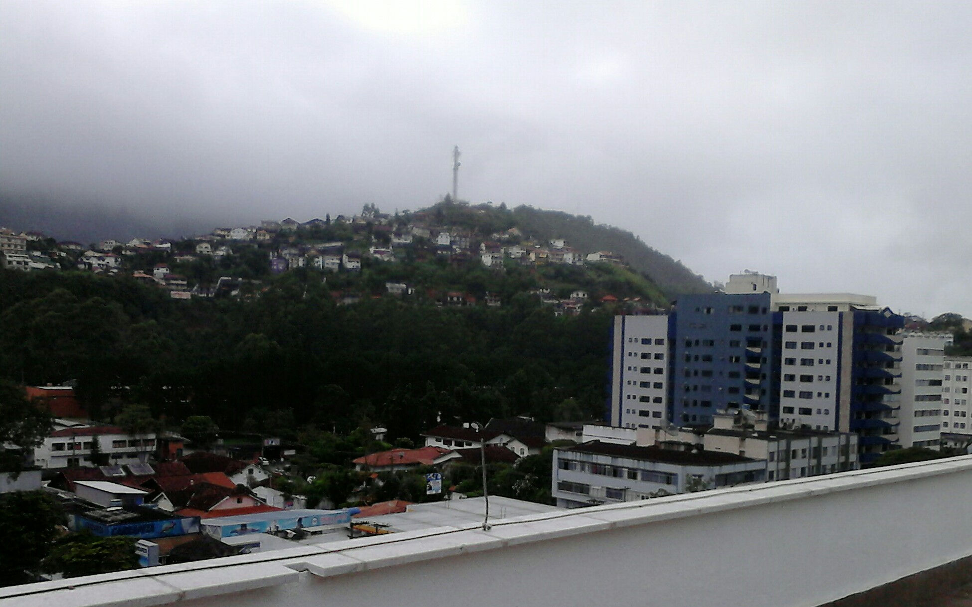 Vista parcial do bairro Fazendinha, em dezembro de 2012.